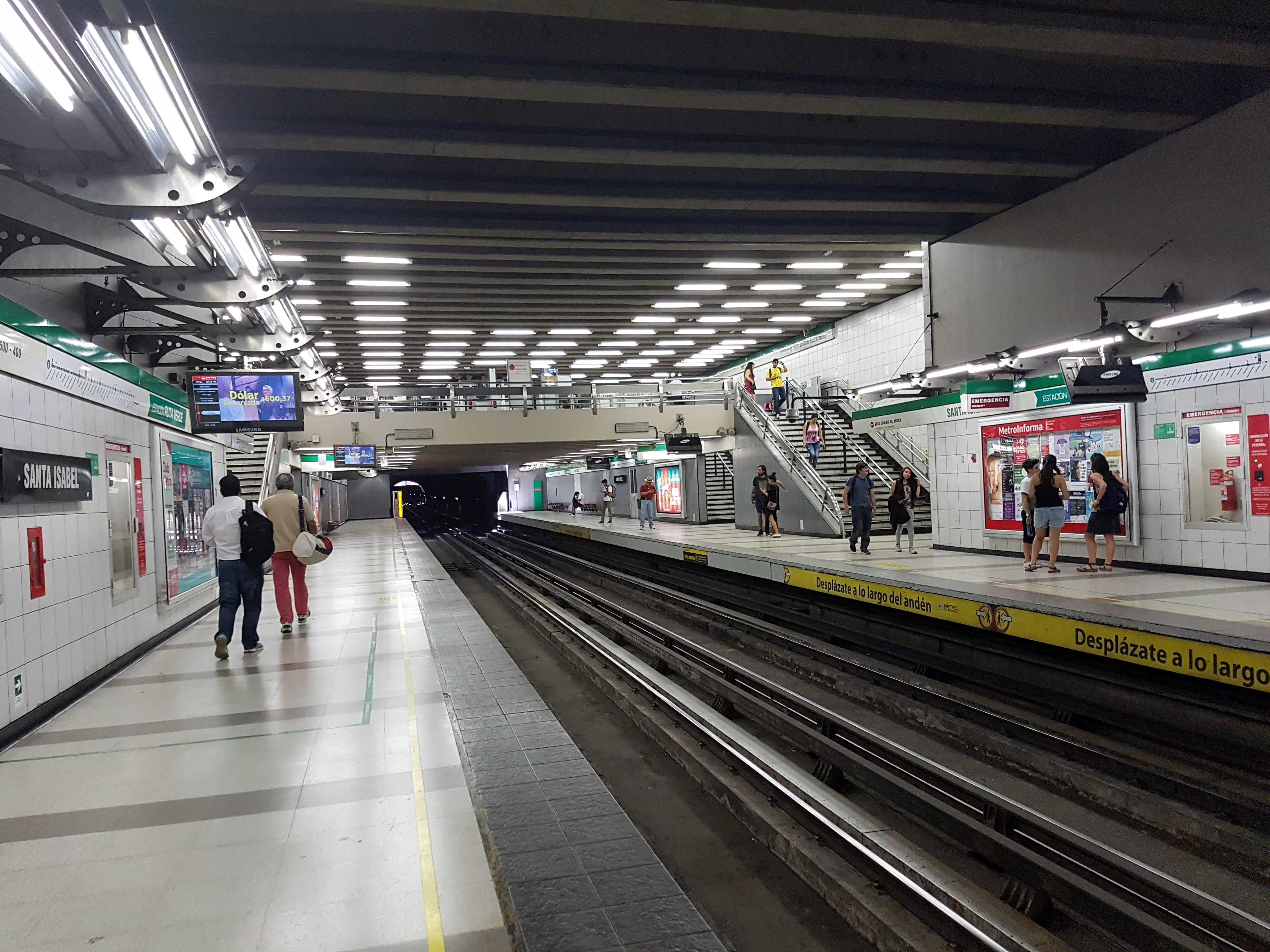 El metro metro Santa Isabel; comuna de Providencia, Santiago de Chile.